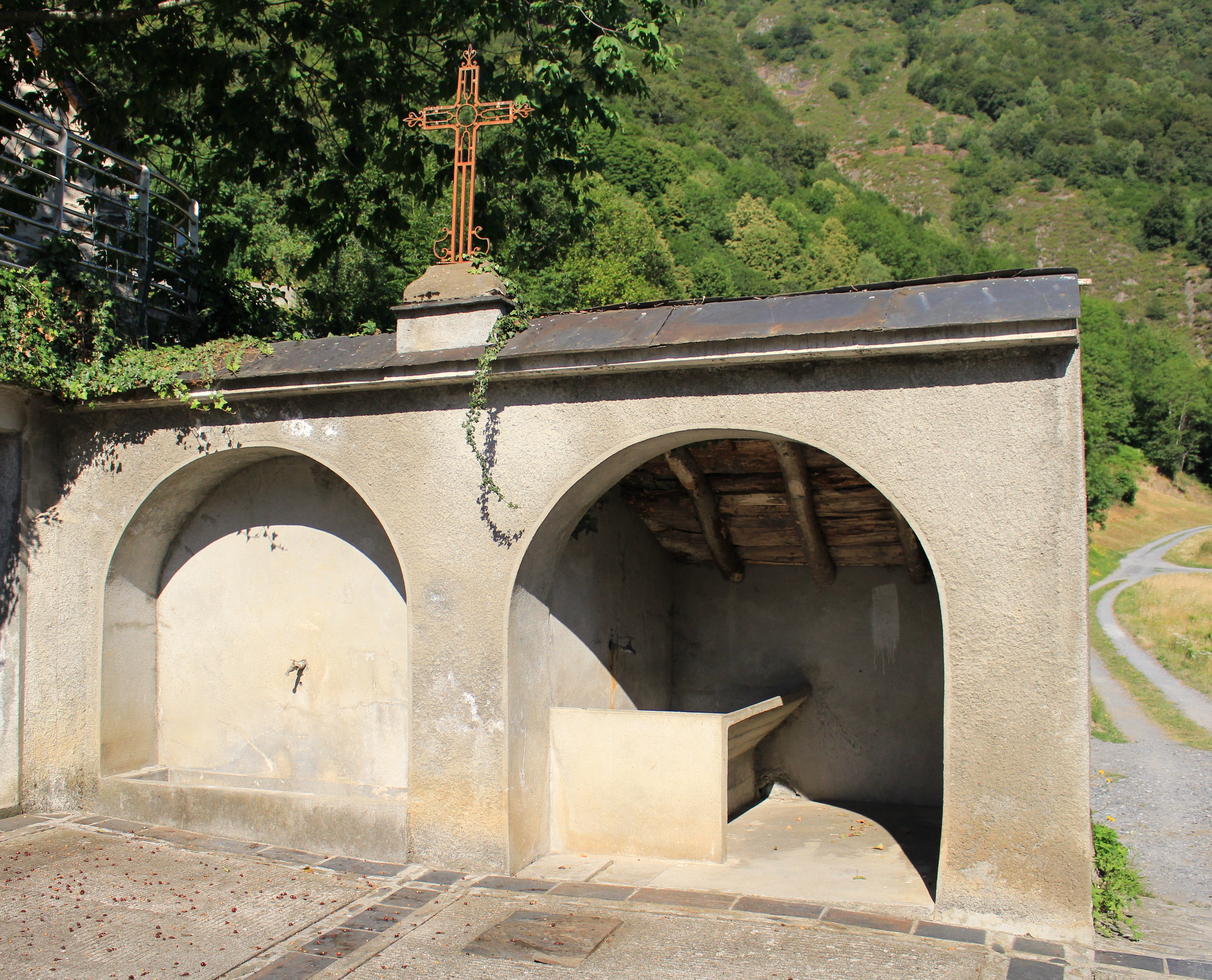 Lavoir de Viscos (Hautes-Pyrénées)